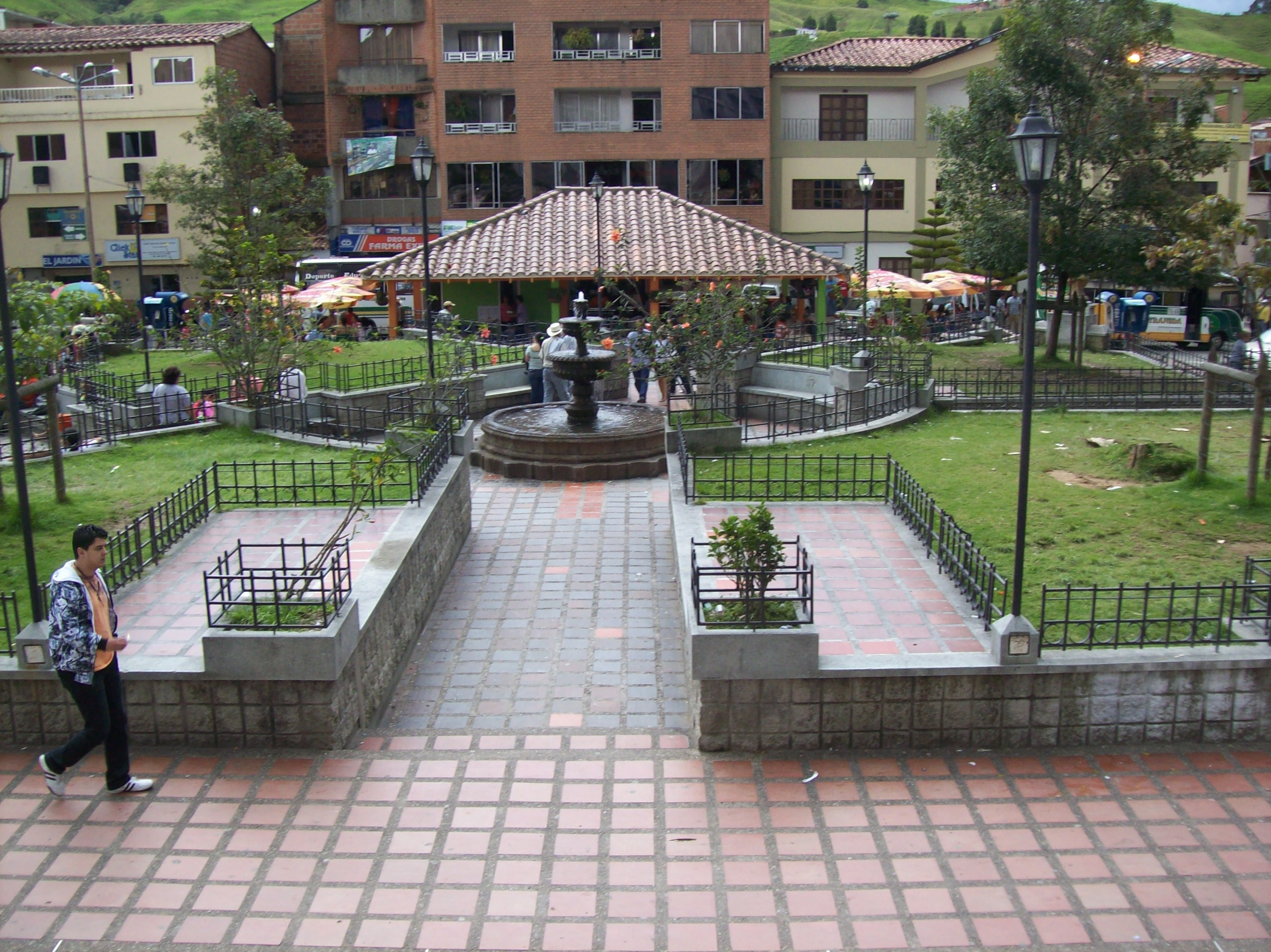 Parque de Donmatías desde el atrio de la Iglesia de Nuestra Señora del Rosario.